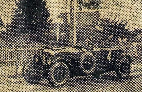 La Bentley de Barnato et Kidston, victorieuse des 24 Heures du Mans 1930.